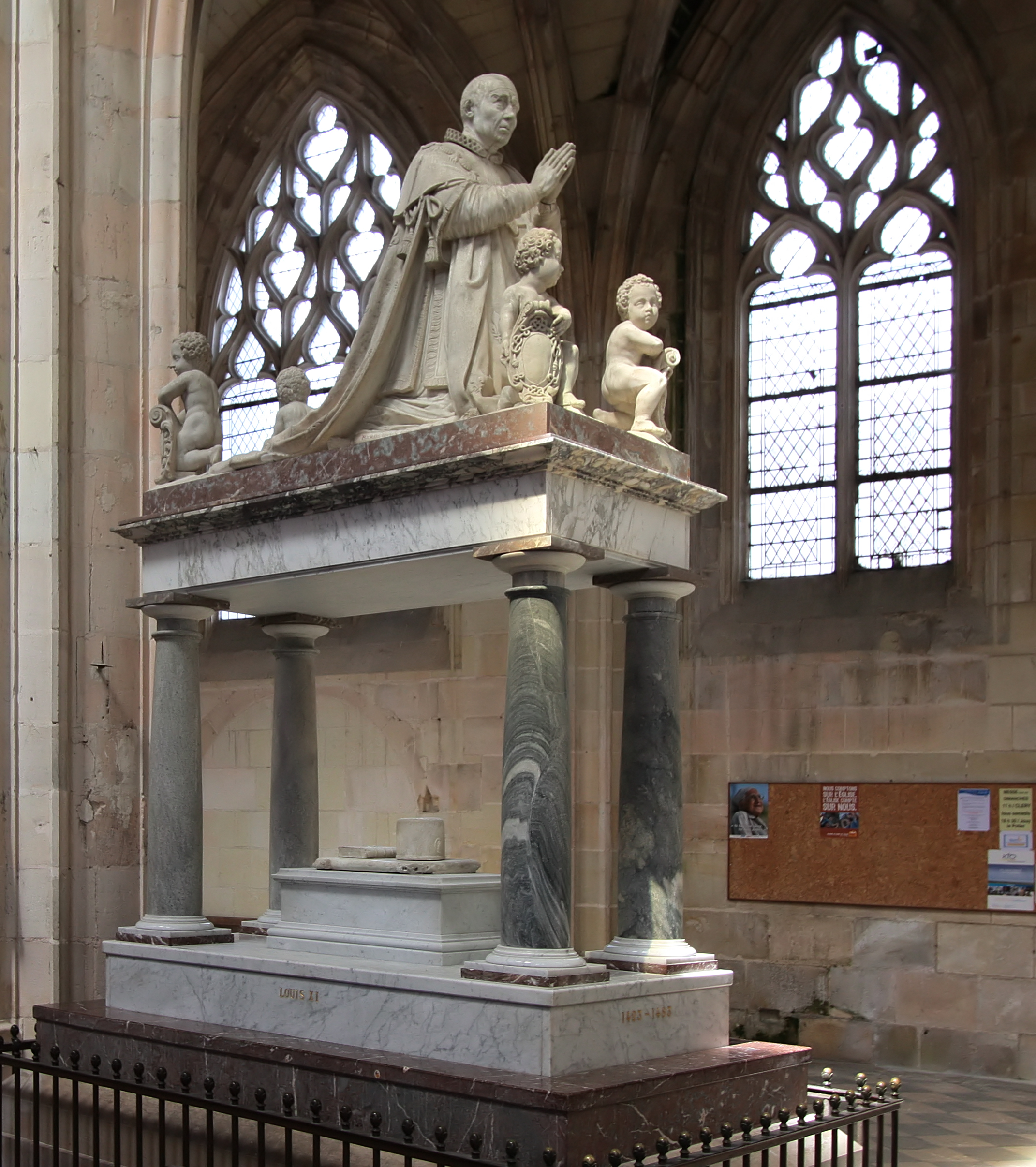 Kirche Notre-Dame de Cléry in der Gemeine Cléry-Saint-André, Département Loiret/Frankreich - Kenotaph Ludwigs XI.